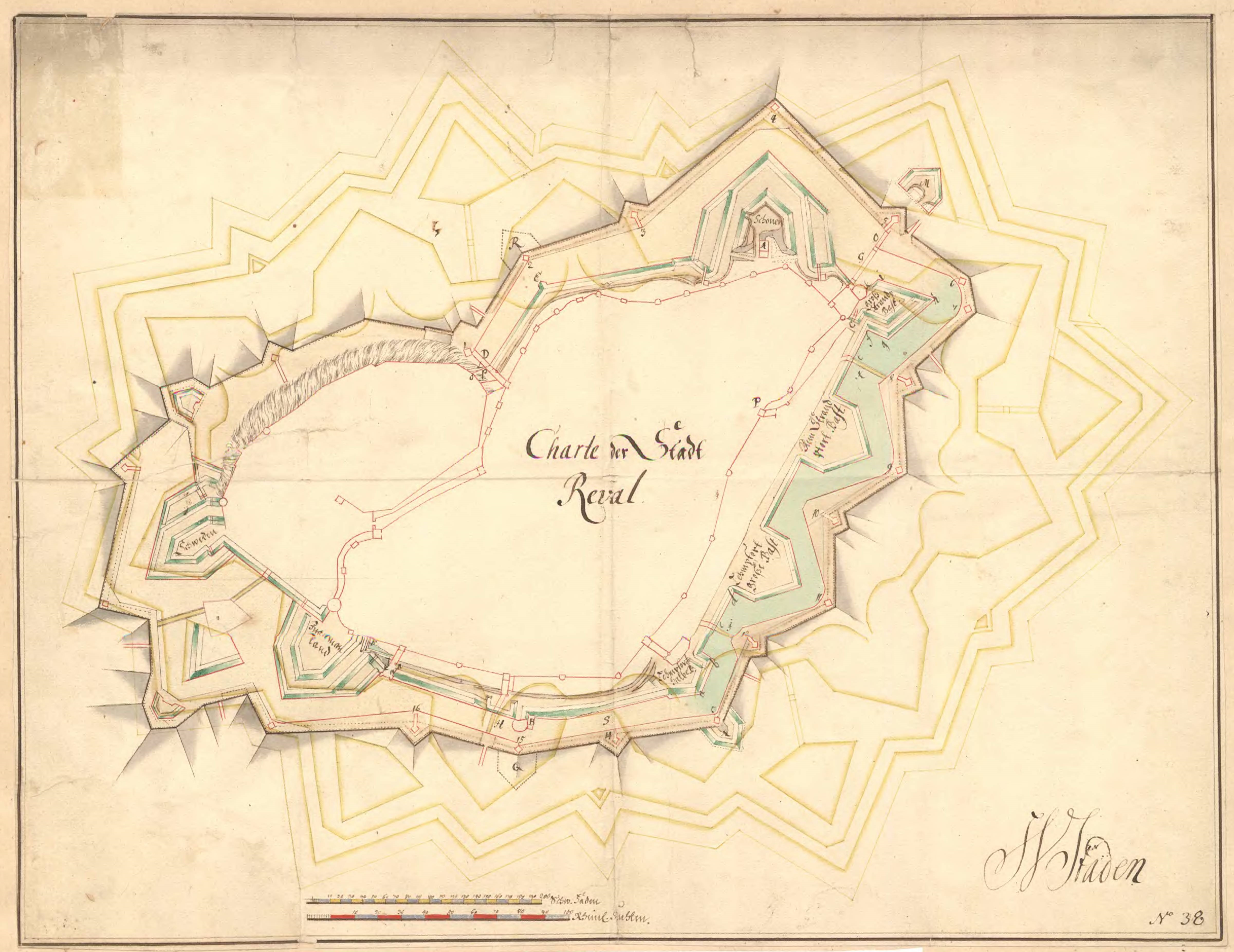 Charte der Stadt Reval